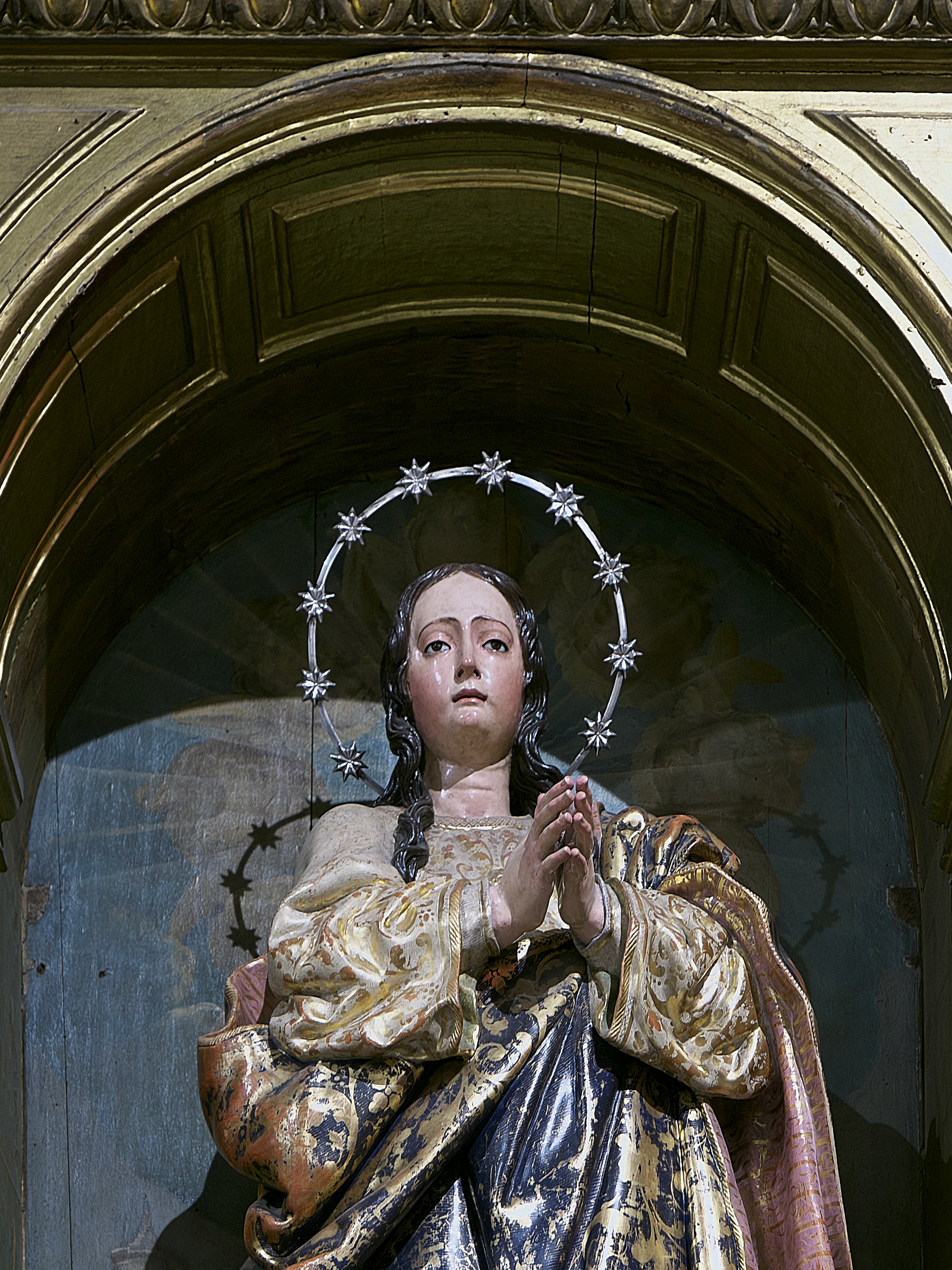 Iglesia de San Lorenzo (Sevilla). Detalle de la imagen de la Inmaculada de Jacinto Pimentel (ca. 1630), importante escultor del taller de Francisco de Ocampo y Felguera. Altar de la Inmaculada